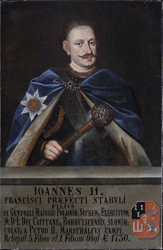 Беларуская (тарашкевіца): Партрэт Яна Казімера Сапегі (Jan Kazimier Sapieha) гербу «Ліс» (каля 1670 — 1730), дзяржаўнага і вайсковага дзеяча Вялікага Княства Літоўскага, гетмана вялікага літоўскага, генэрал-фэльдмаршала расейскай службы, генэрал-губэрнатара Пецярбургу.